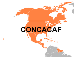 Mapa com os países associados à CONCACAF